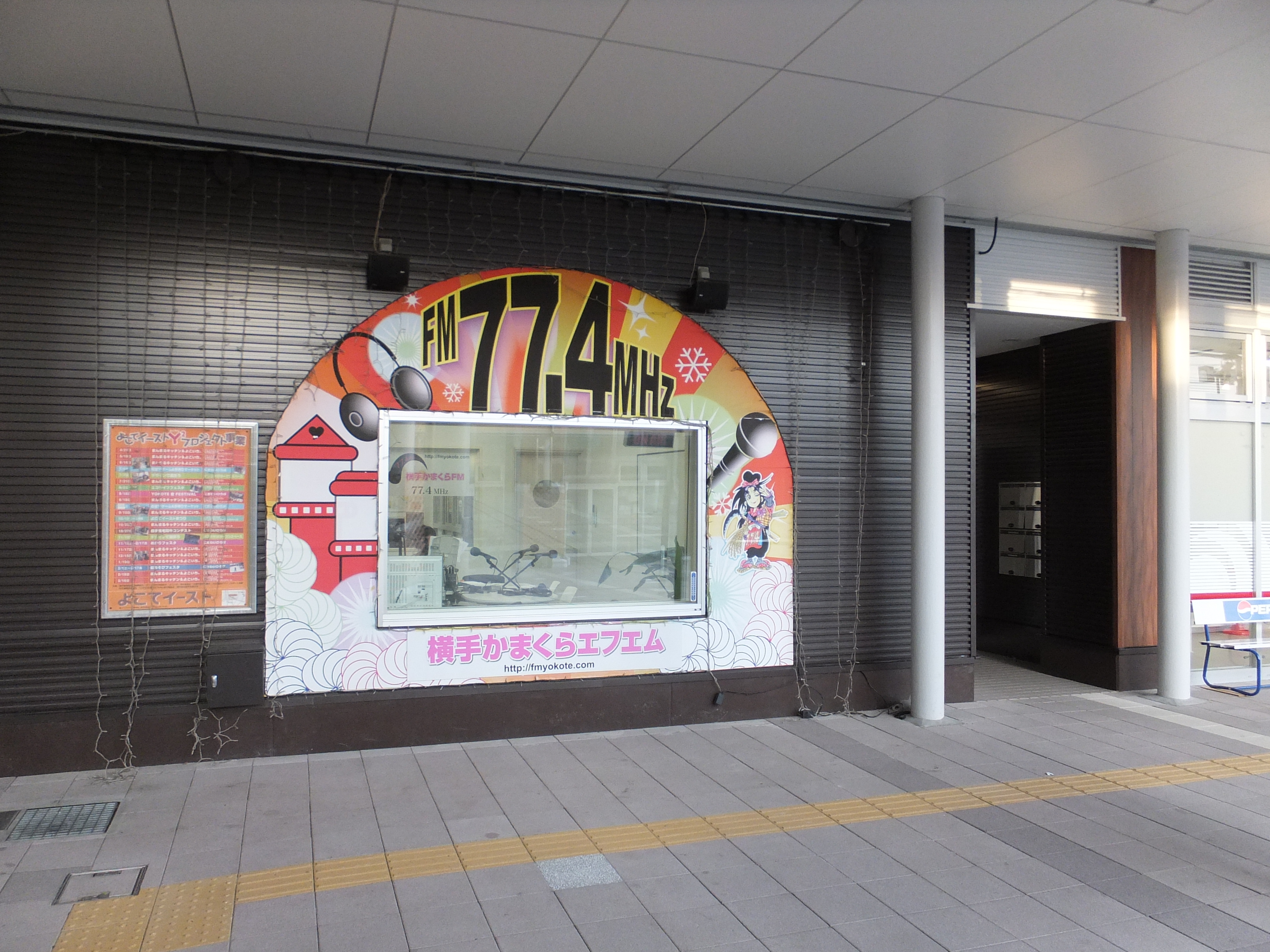 横手かまくらFMスタジオ。横手駅東口にある再開発施設、よこてイースト内にある。